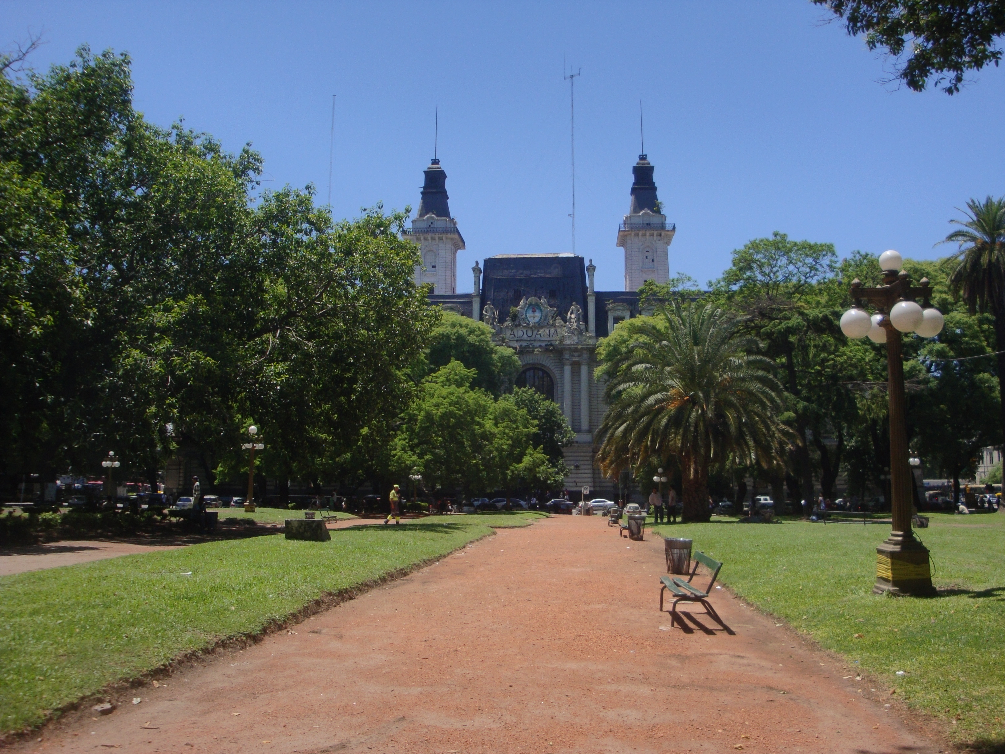 Plaza Agustín P. Justo, ubicada en Av. Paseo Colón 300, Buenos Aires.